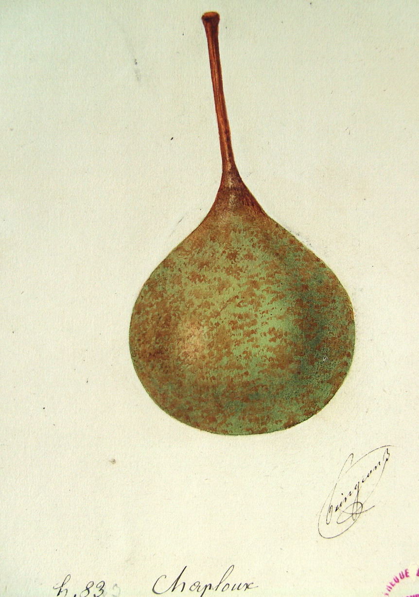 Chaploux